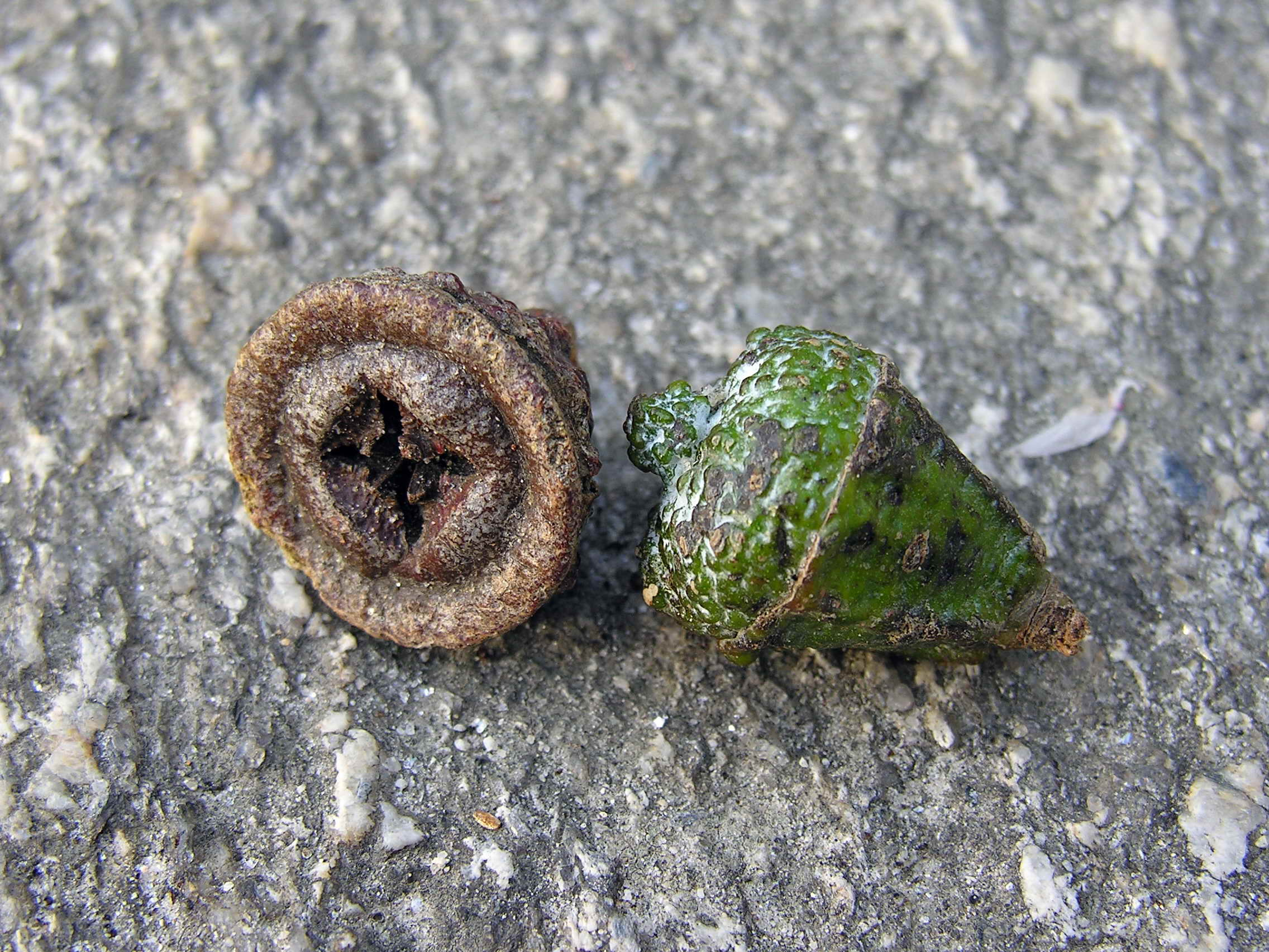 self made